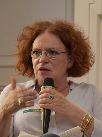 Anetta Kahane (Amadeu-Antonio-Stiftung) und Prof. Dr. Naika Foroutan (Humboldt-Universität Berlin)